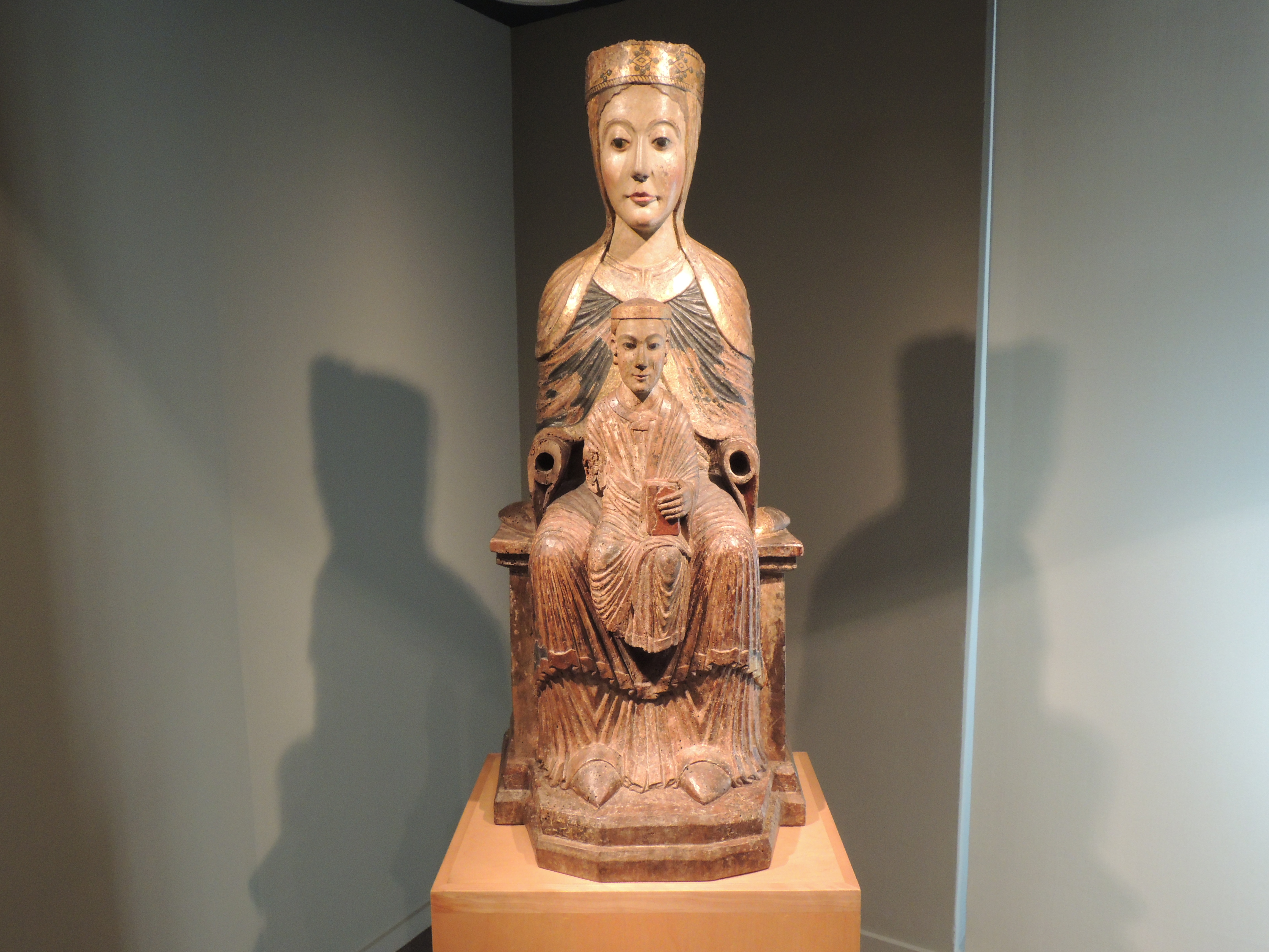 Virgen con el niño. Talla románica del siglo XII procedente de la ermita de San Millán de Puentedura (Burgos).